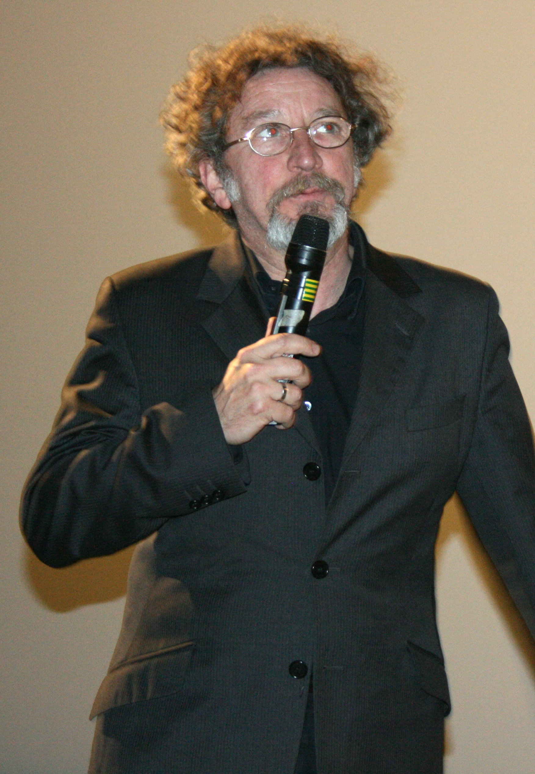 Robert Guédiguian à l'avant-première de Lady Jane diffusée à l'UGC Ciné Cité Les Halles, à Paris.